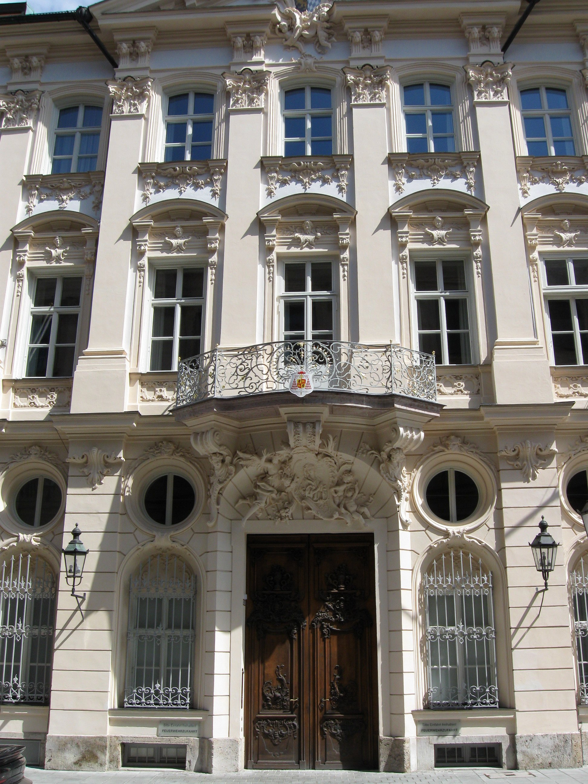 Kardinal-Faulhaber-Straße 7. Ehem. Adelspalais, sog. Palais Holnstein, seit 1818 Erzbischöfliches Palais, mit um einen Innenhof gruppierten Flügeln, dreigeschossiger Bau mit reicher Rokokogliederung und Dreiecksgiebel, von Francois de Cuvilliés d. Ä., 1735/37; mit Innenausstattung.